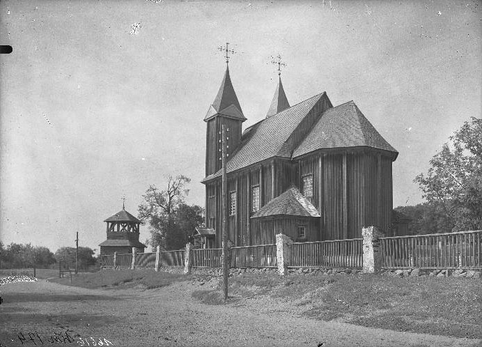 Беларуская (тарашкевіца): Лявонпаль (Lavonpal). Царква